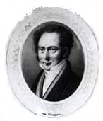 George Gerson (1790-1825), dansk komponist. Billedet er første gang trykt i 1820 på et nodehæfte